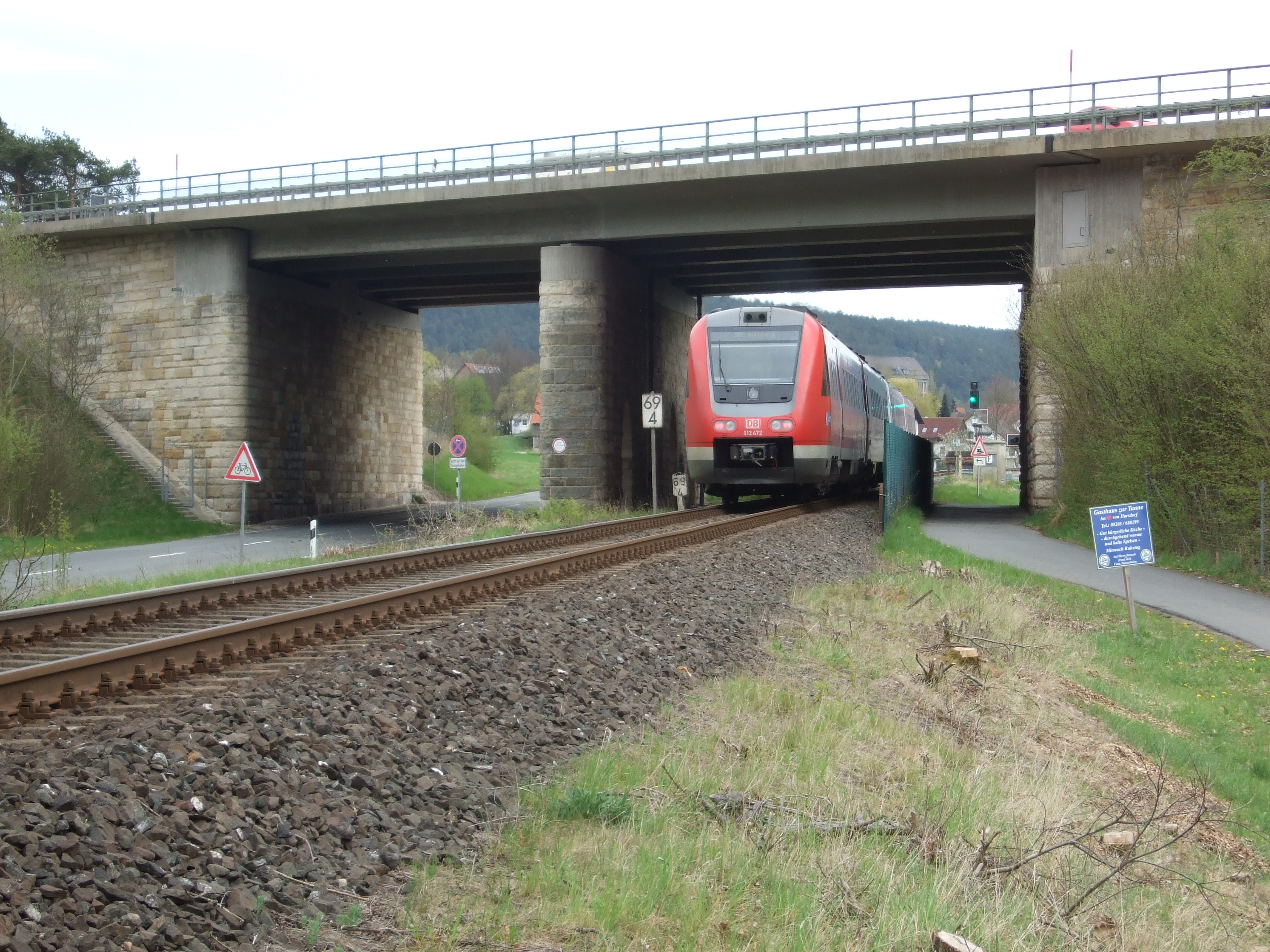 Bahn- und Straßenbrücke A70